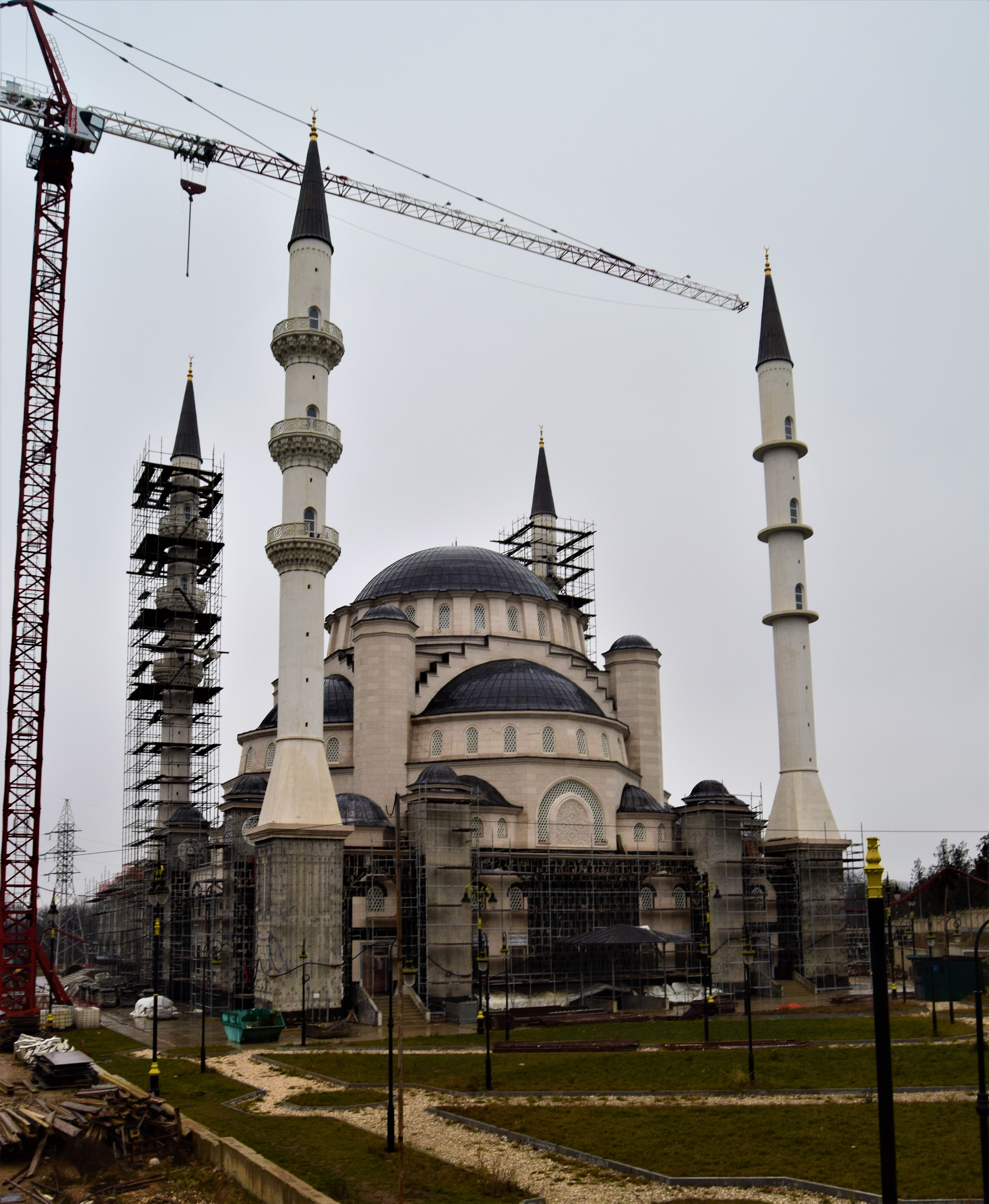 Симферопольская соборная мечеть на Ялтинском шоссе, строящаяся с 2015 года. До этого более 20 лет крымские татары добивались разрешения на строительство мечети именно в этом месте, но получали отказ от правительства Крыма.